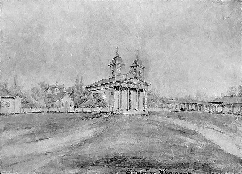 Костел Внебовзяття (Взяття на Небеса) Пресвятої Діви Марії, Умань. Наполеон Орда.